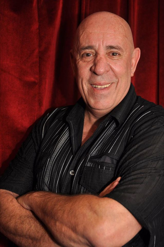 Fernando Caride